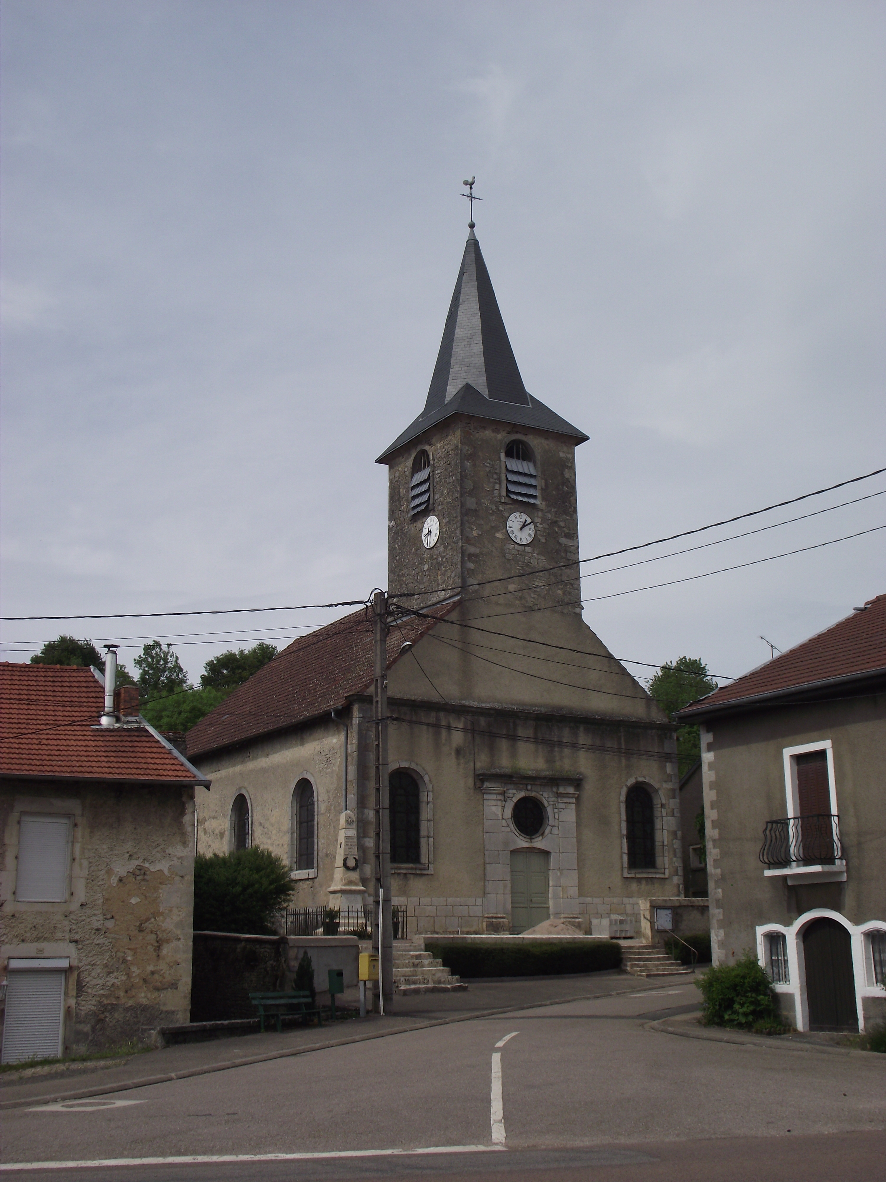 Église de Martigny-les-Gerbonvaux au centre du village.